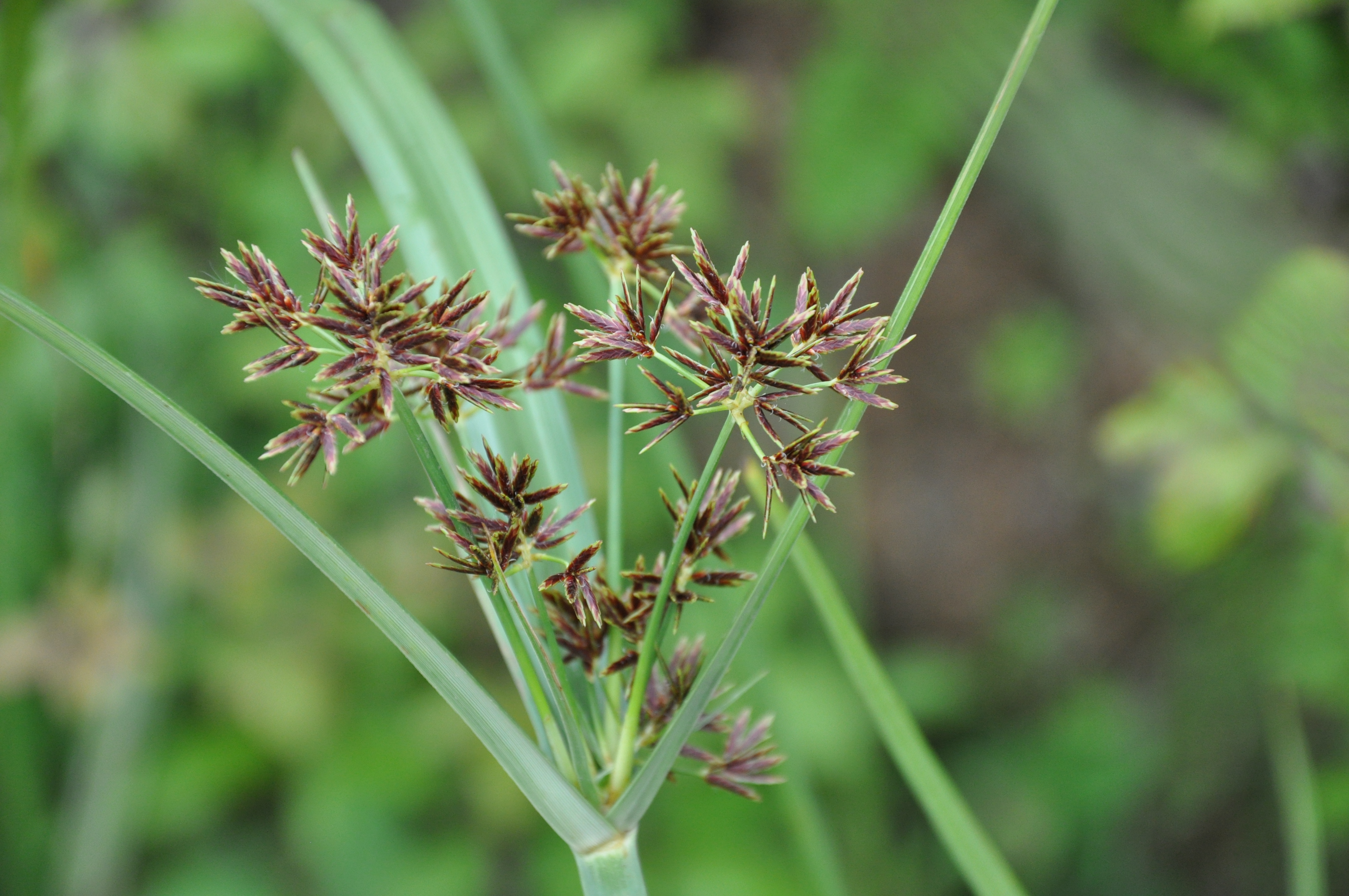 Juncia loca (Cyperus longus) en Ceuta, España.